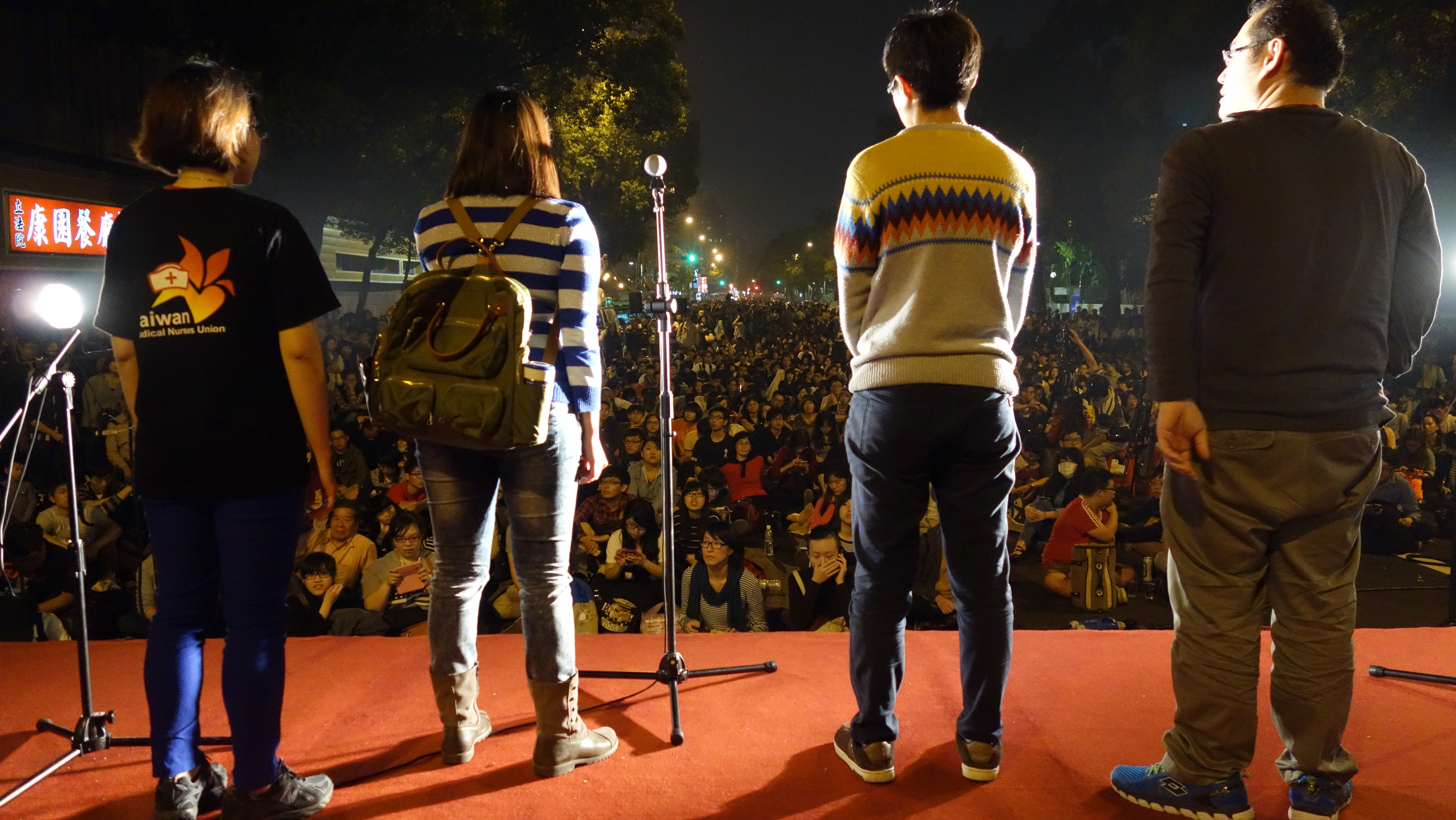 萬人反服貿。